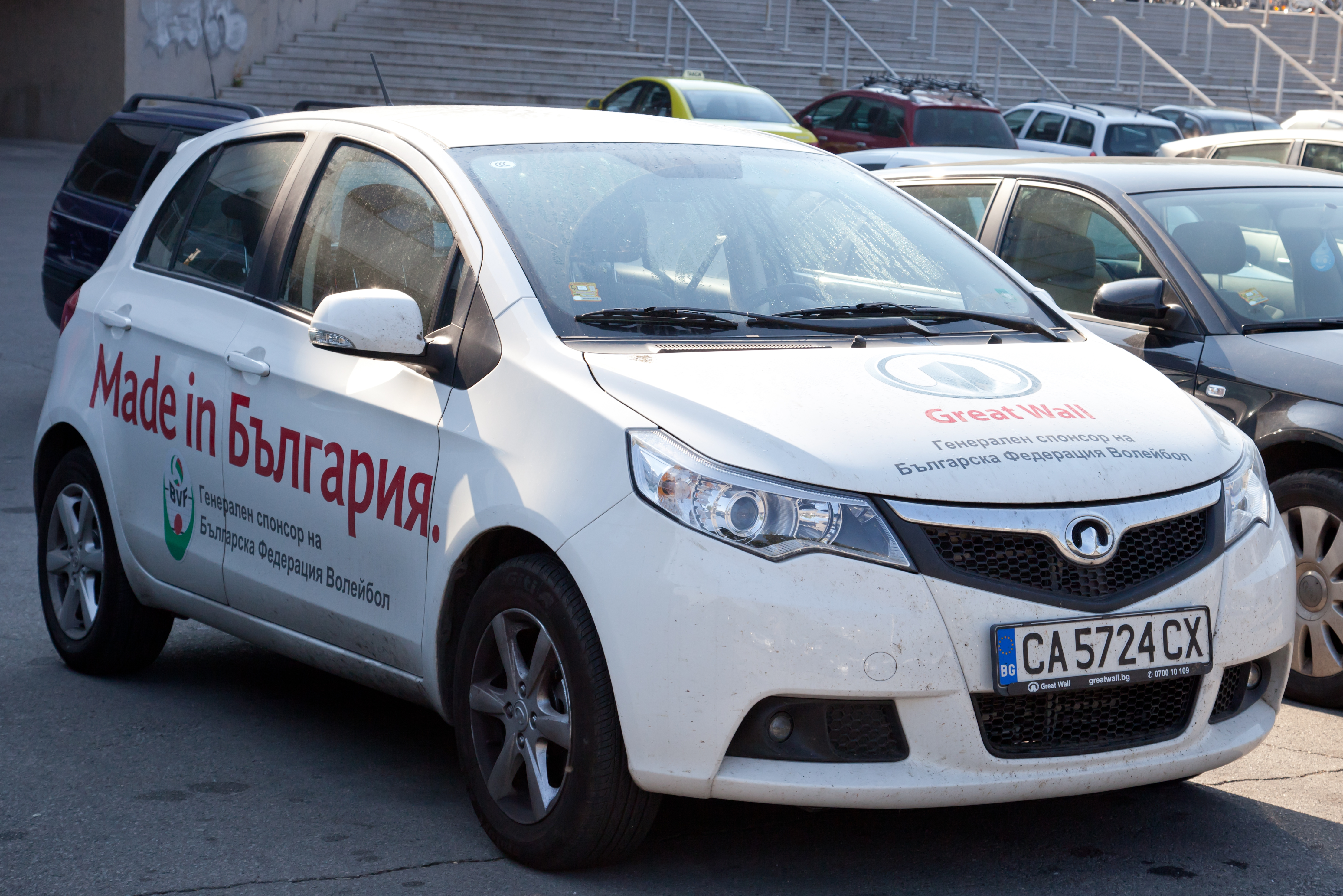 Wassil-Lewski-Nationalstadion; Sofia, Bulgarien